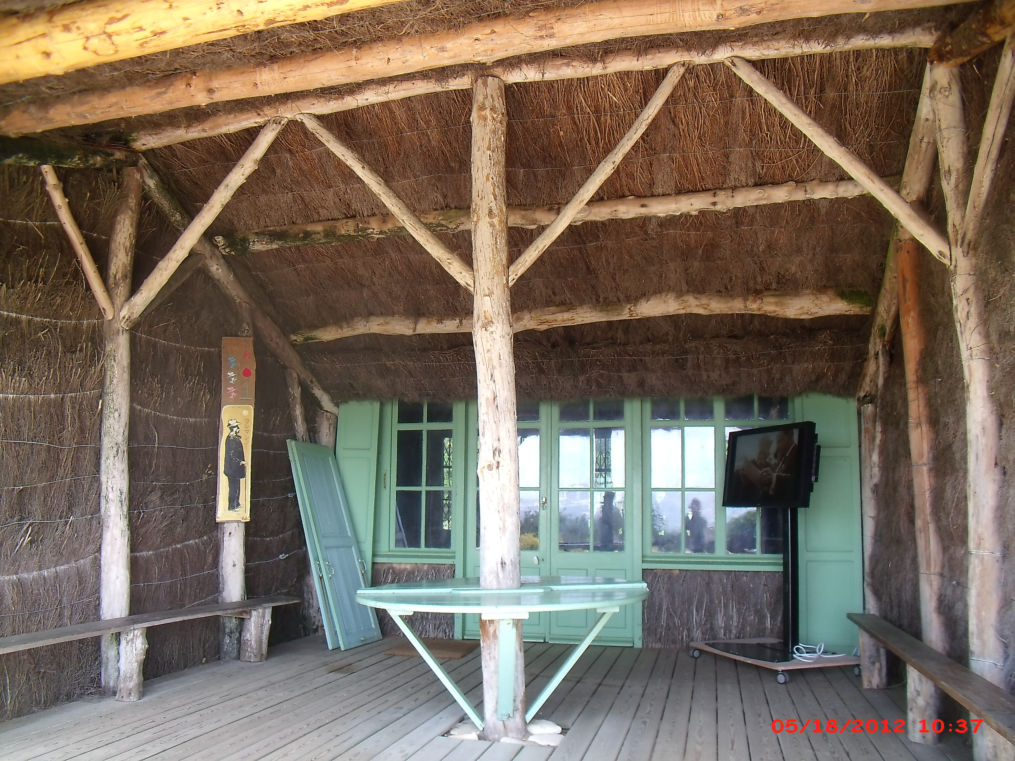 Maison de Georges Clémenceau, Saint-Vincent-sur-Jard (Vendée). Le "kiosque" où Georges Clémenceau prenait son café et recevait ses visiteurs (construit en 1921).